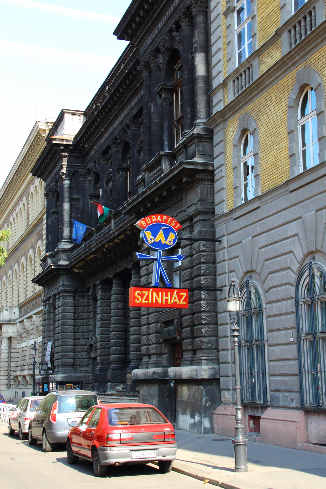 Régi Műcsarnok épülete (Budapest 6, Andrássy út 69.) This is a photo of a monument in Hungary, Identifier: 713